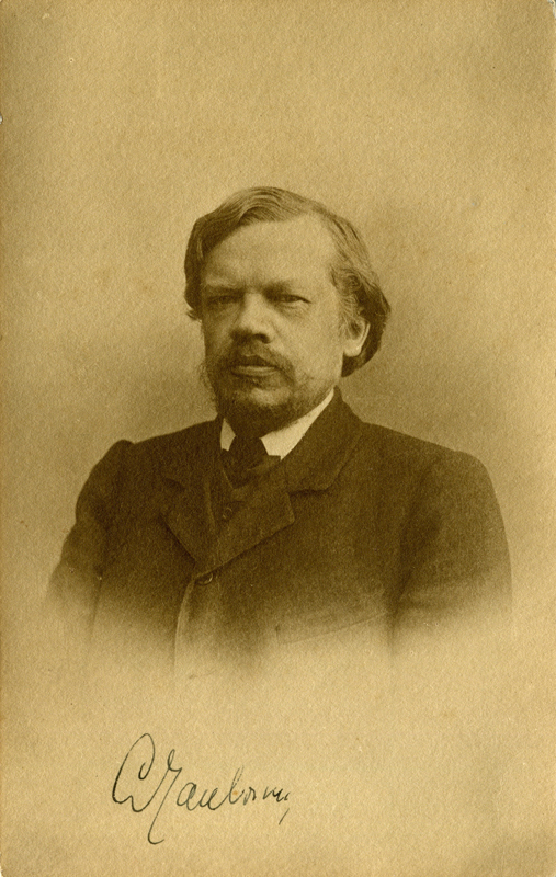 Портрет профессора Сергея Алексеевича Чаплыгина.